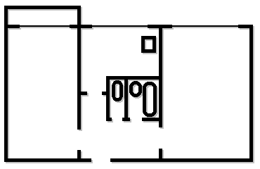 План 2-кімнатної хрущовки